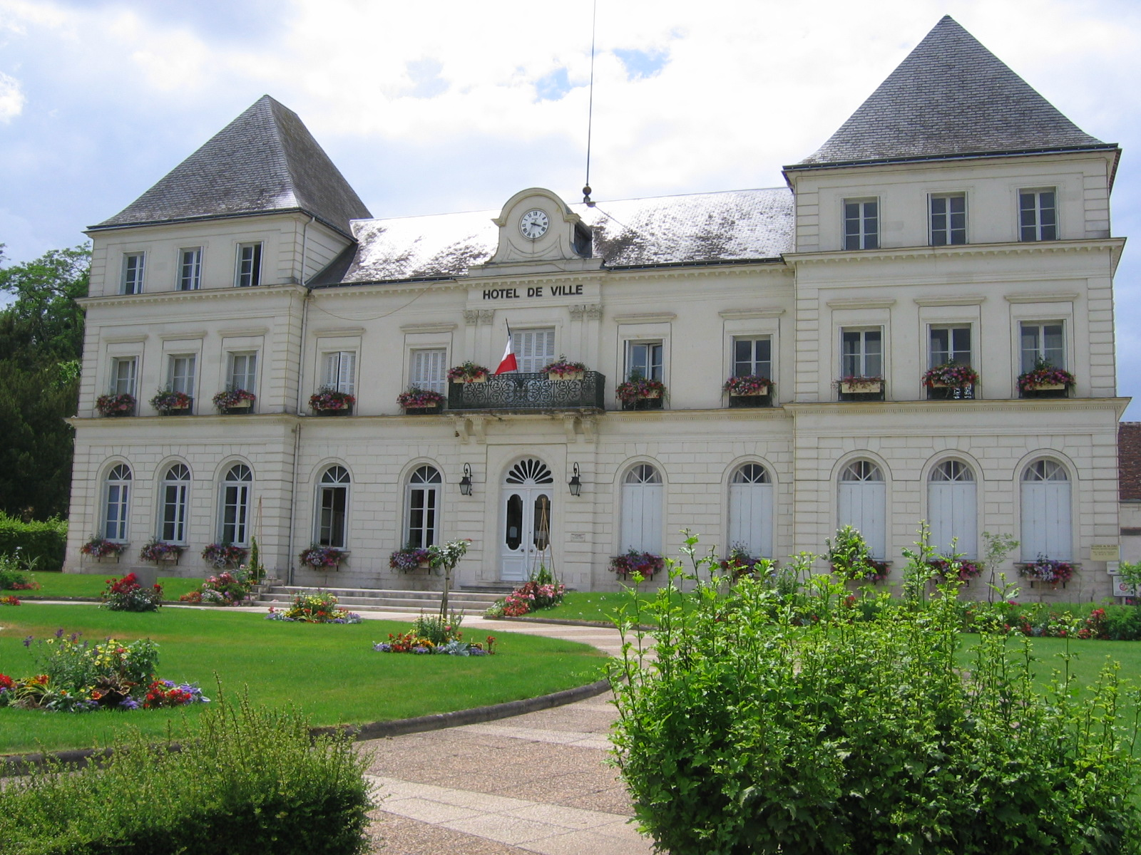 Mairie de Bléré, ou La Coursicauderie